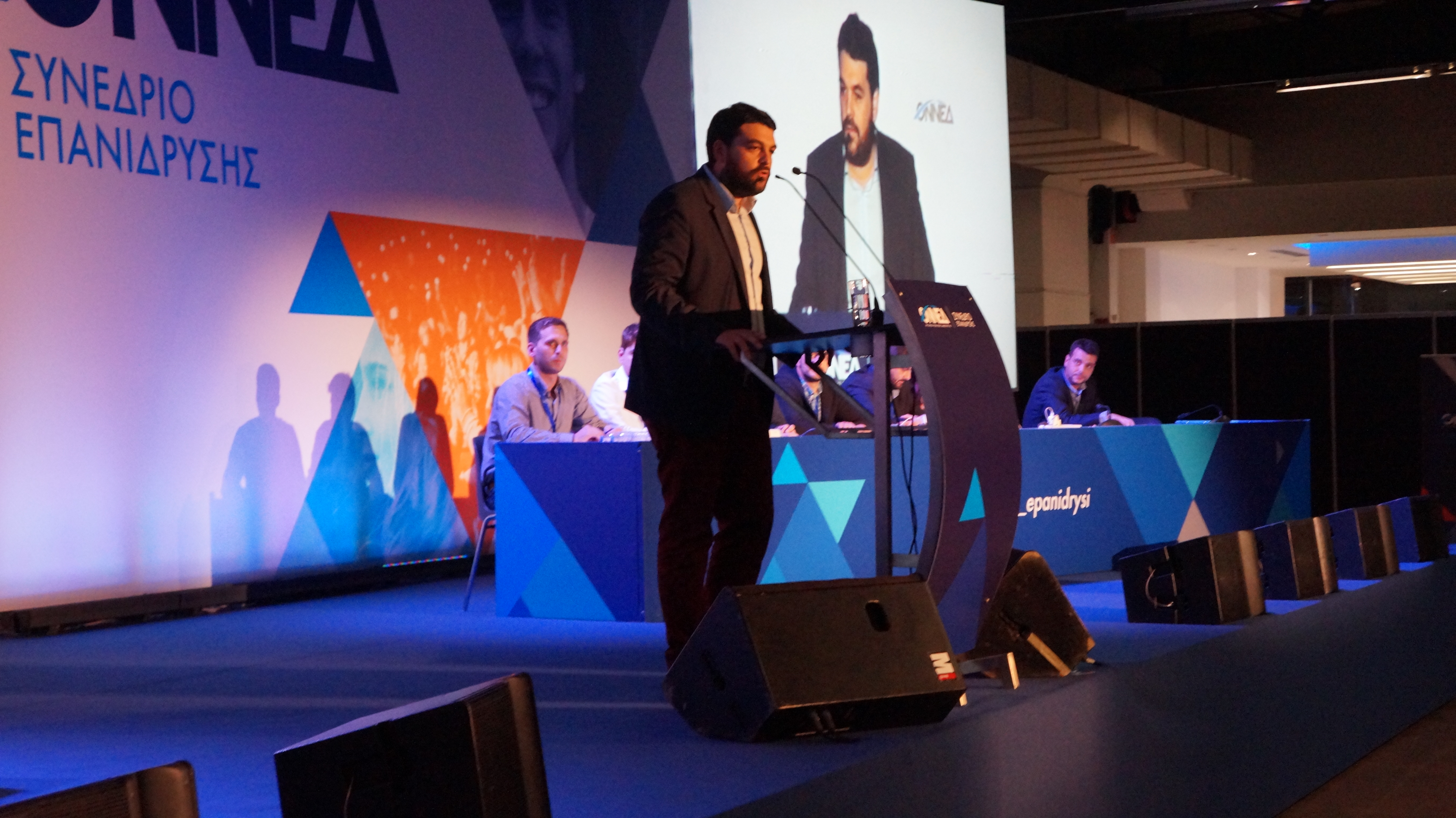 Κώστας Δέρβος, Πρόεδρος ΟΝΝΕΔ